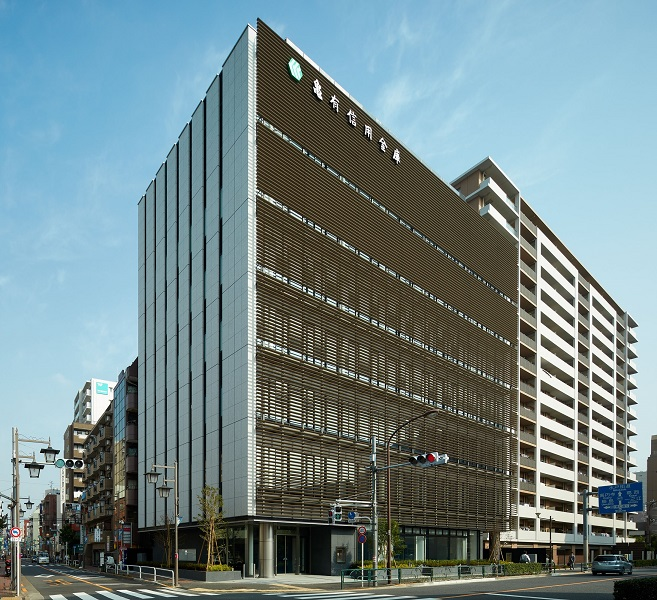 亀有信用金庫